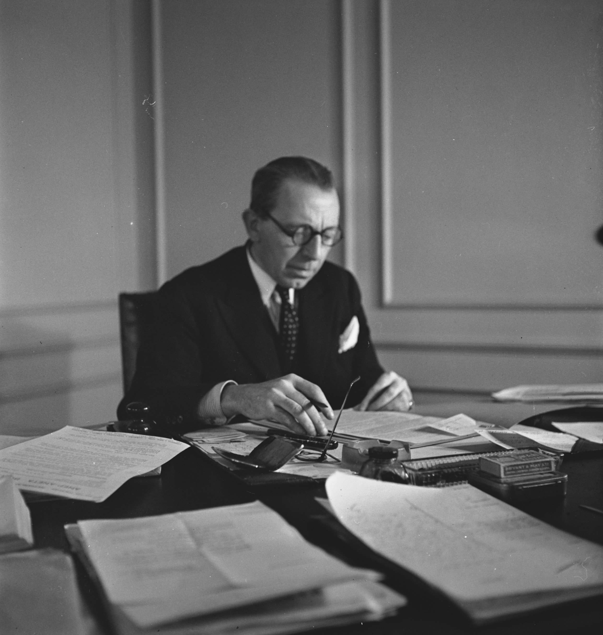 Collectie / Archief : Fotocollectie Anefo Reportage / Serie : P [Portraits/Persons] / Anefo Londen serie Beschrijving : Dr. J.R.M. van Angeren, minister van Justitie Annotatie : Minister van 21 februari 1942 tot 12 juli 1944 Datum : maart 1942 Locatie : Groot-Brittannië, Londen Trefwoorden : kabinetten, ministers, portretten, regeringen, tweede wereldoorlog Persoonsnaam : Angeren, J.R.M. van Fotograaf : Onbekend / Publiek Domein Auteursrechthebbende : Nationaal Archief Materiaalsoort : Negatief (zwart/wit) Nummer archiefinventaris : bekijk toegang 2.24.01.03 Bestanddeelnummer : 935-0537